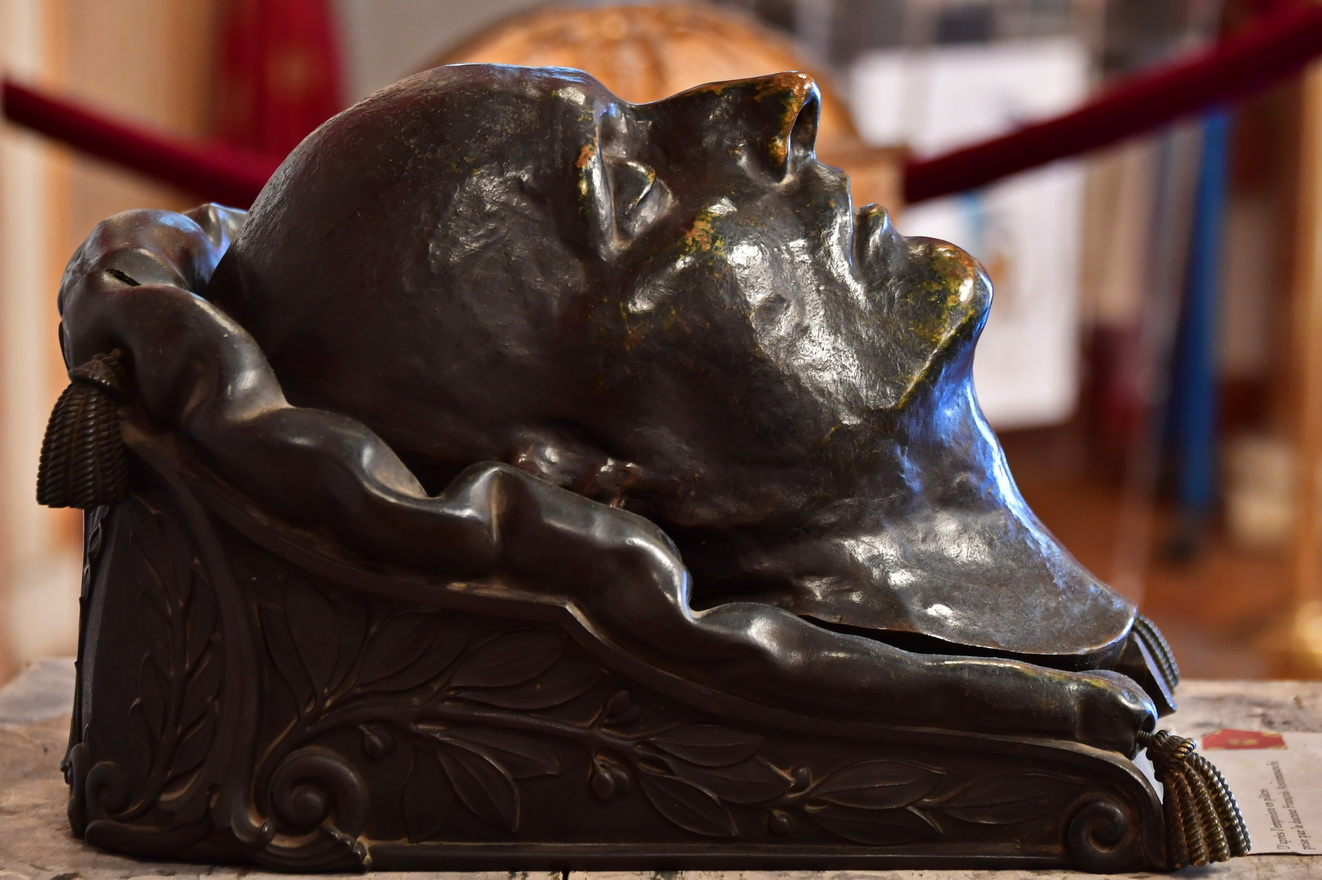 Napoleon Totenmaske, Ajacci, Musée - Salon napoléonien de l'hôtel de ville